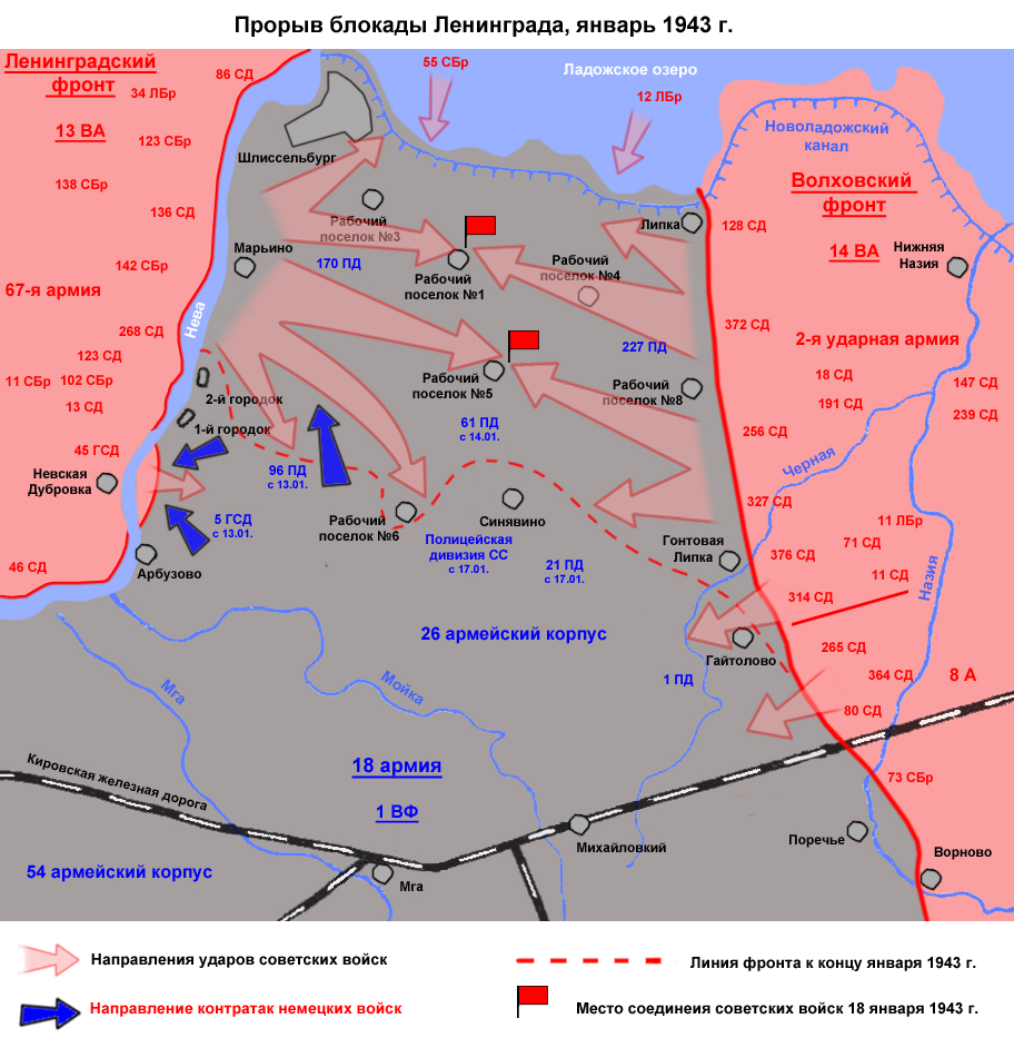 Прорыв блокады Ленинграда, январь 1943 г.